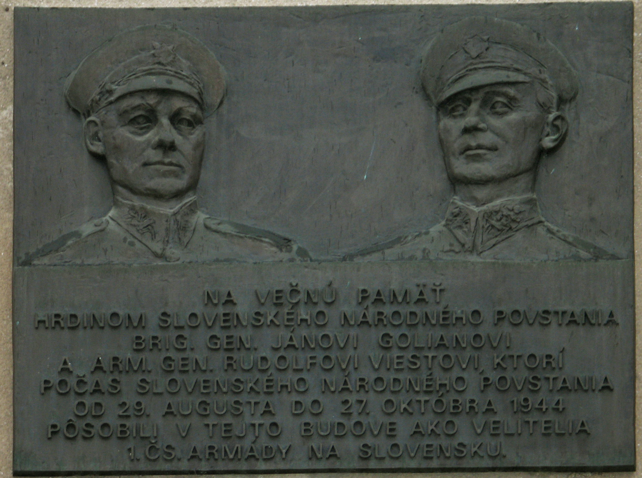 Pamätná tabuľa veliteľom povstaleckej armády generálom R. Viestovi a Golianovi